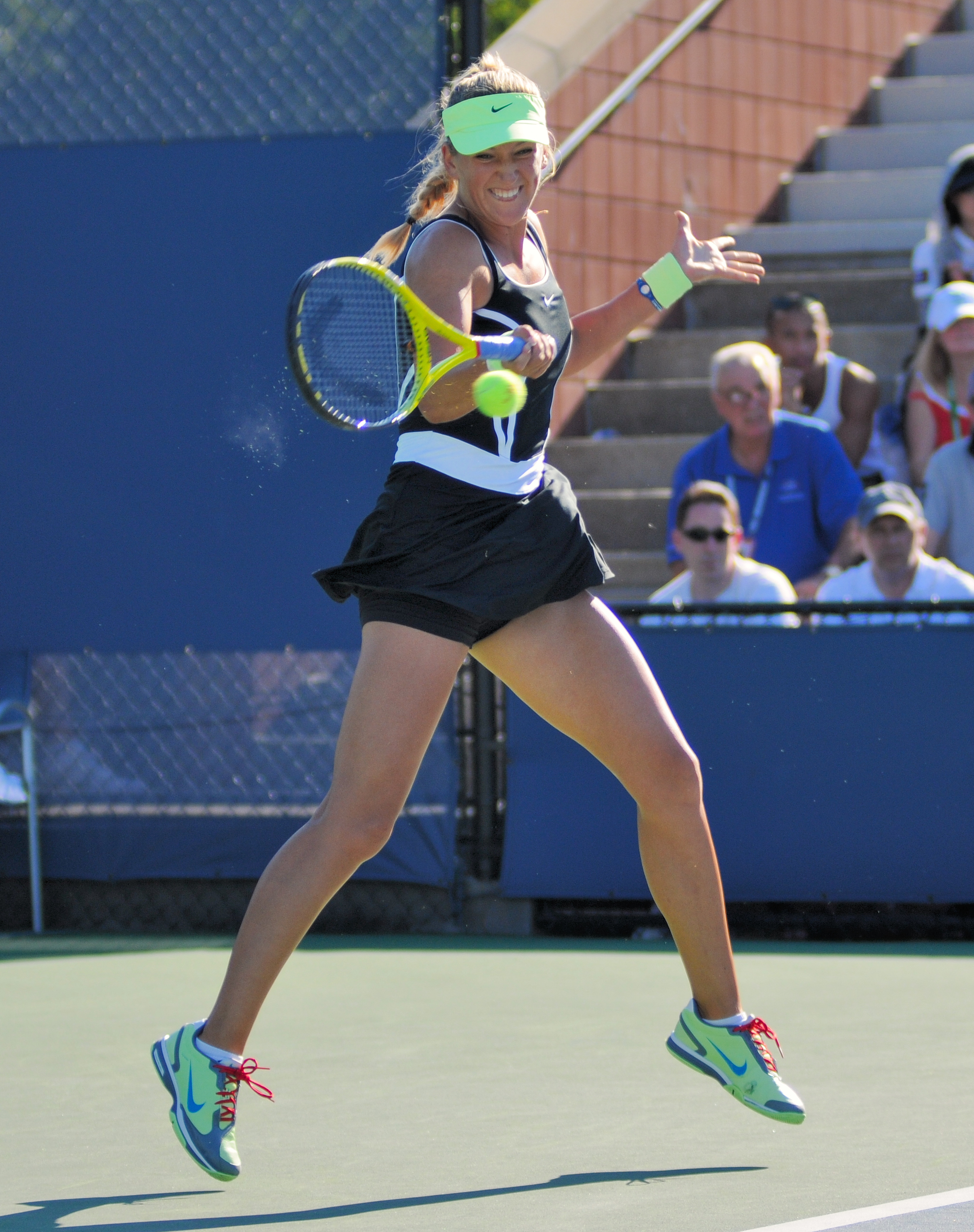 Victoria Azarenka - US Open 2010